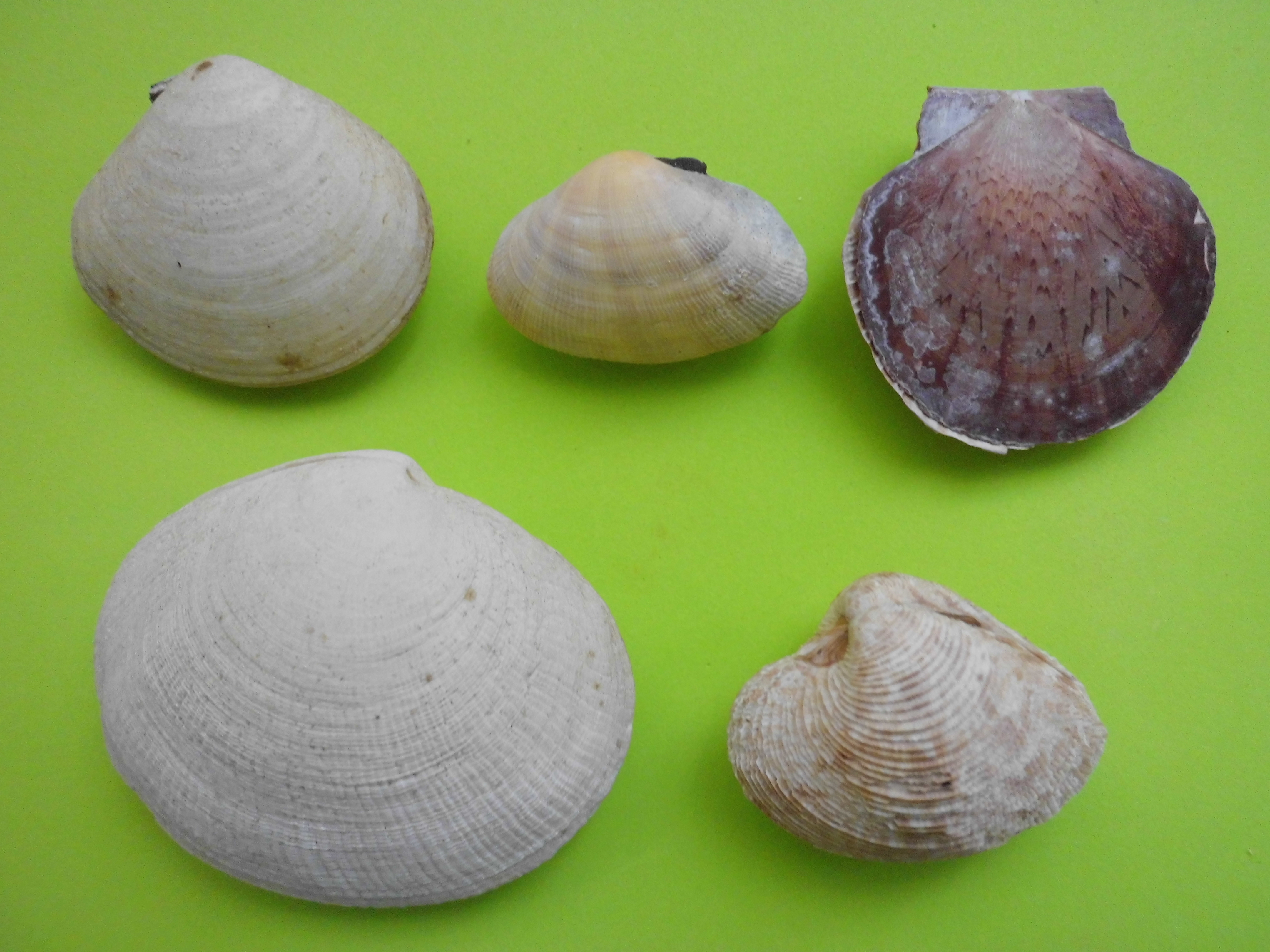 Bivalvos de Venezuela en la imagen se observan las siguientes especies: Asaphis deflorata (Linnaeus, 1758) Arcopagia fausta (Pulteney, 1799) Euvola laurenti (Gmelin, 1791) Codakia orbicularis (Linnaeus, 1758) Globivenus listeroides (Fischer-Piette & Testud, 1967) Nota. todas esta especies provienen de Isla La Tortuga, Dependencia Federales